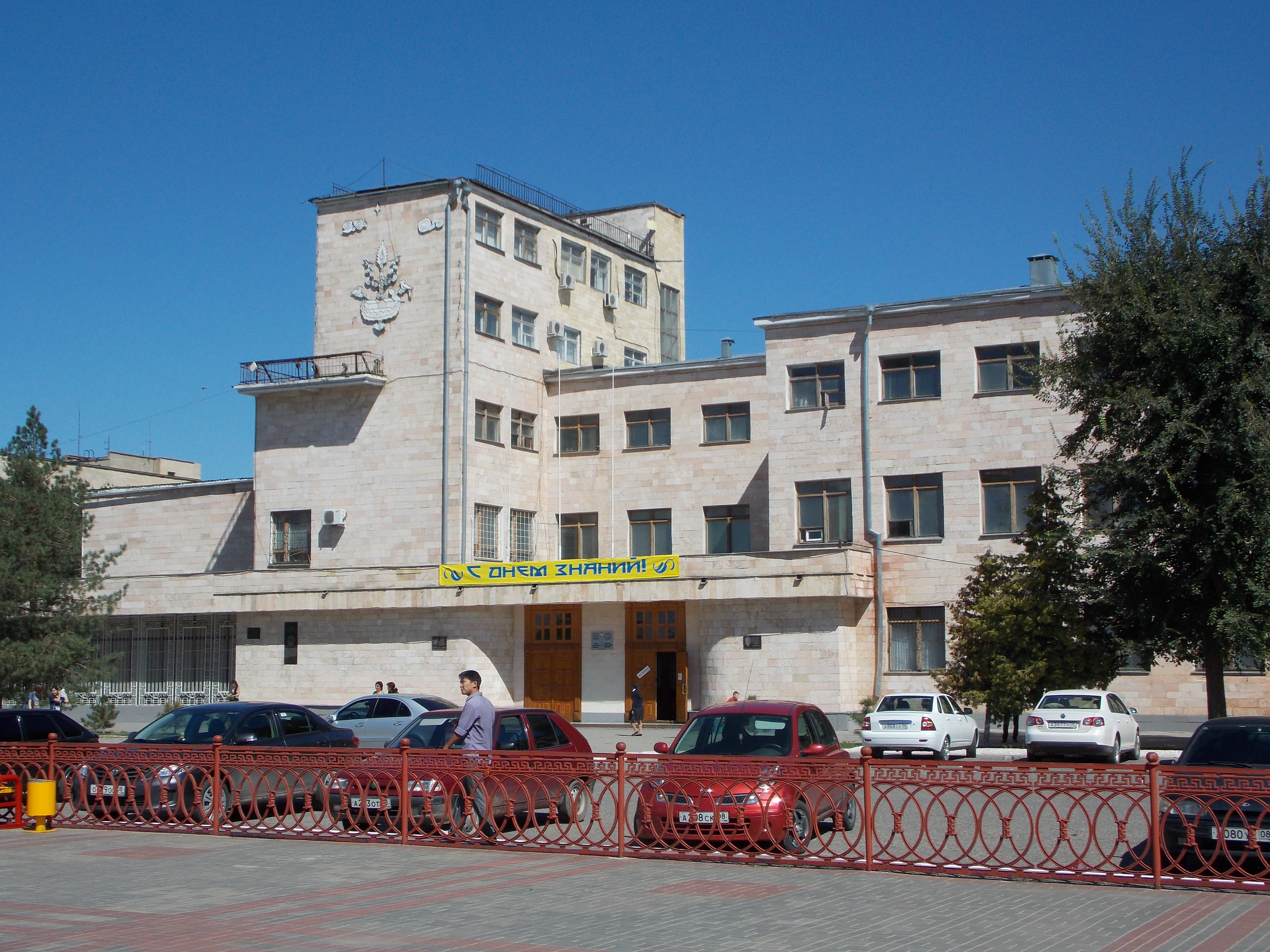 Первый корпус Калмыцкого университета. Архитекторы - Илья Голосов и Борис Миттельман. Памятник федерального значения.